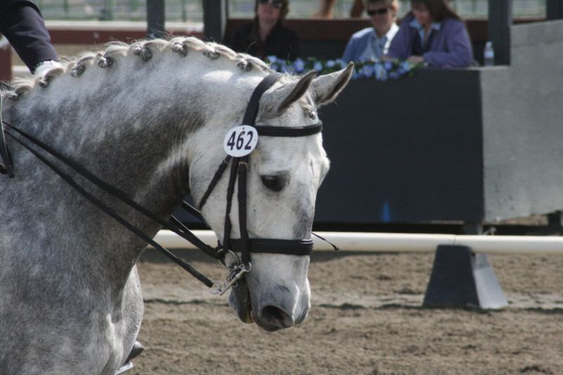 Gray Warmblood